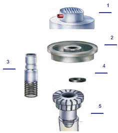 Schematischer Aufbau des Ventils einer Sprühdose